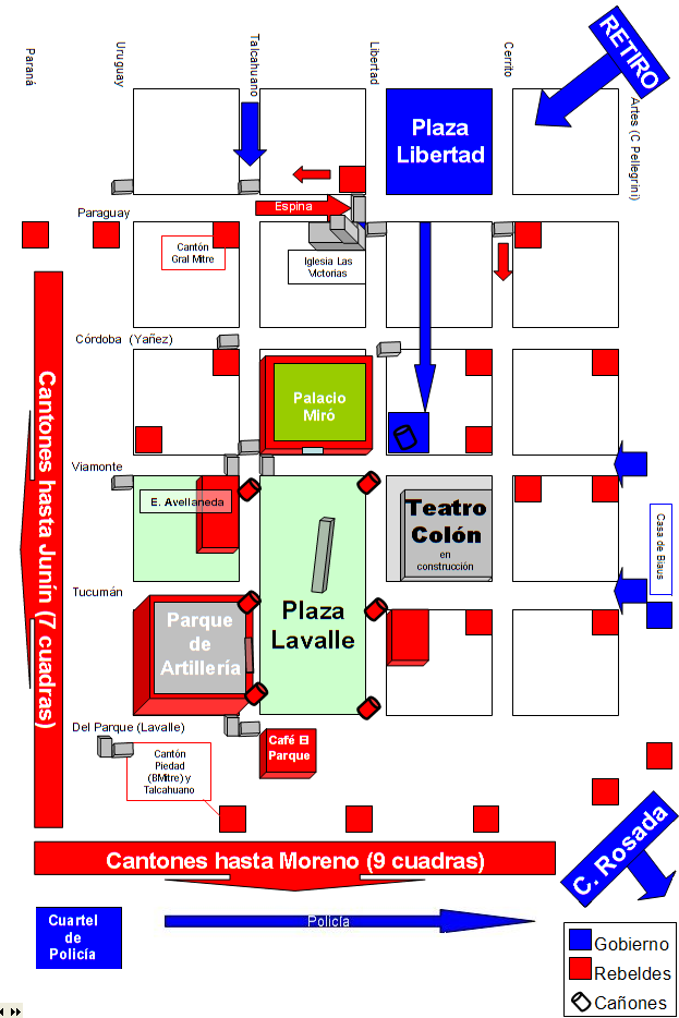 Mapa de operaciones. Revolución de 1890 o del Parque. Buenos Aires. Argentina.